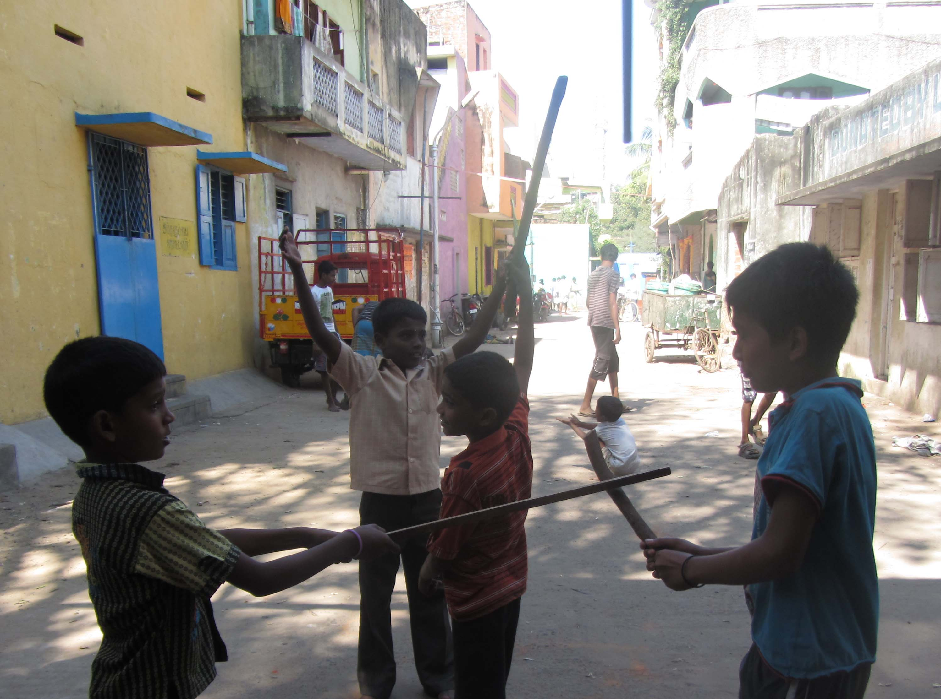 காக்கா கம்பு விளையாட்டு.